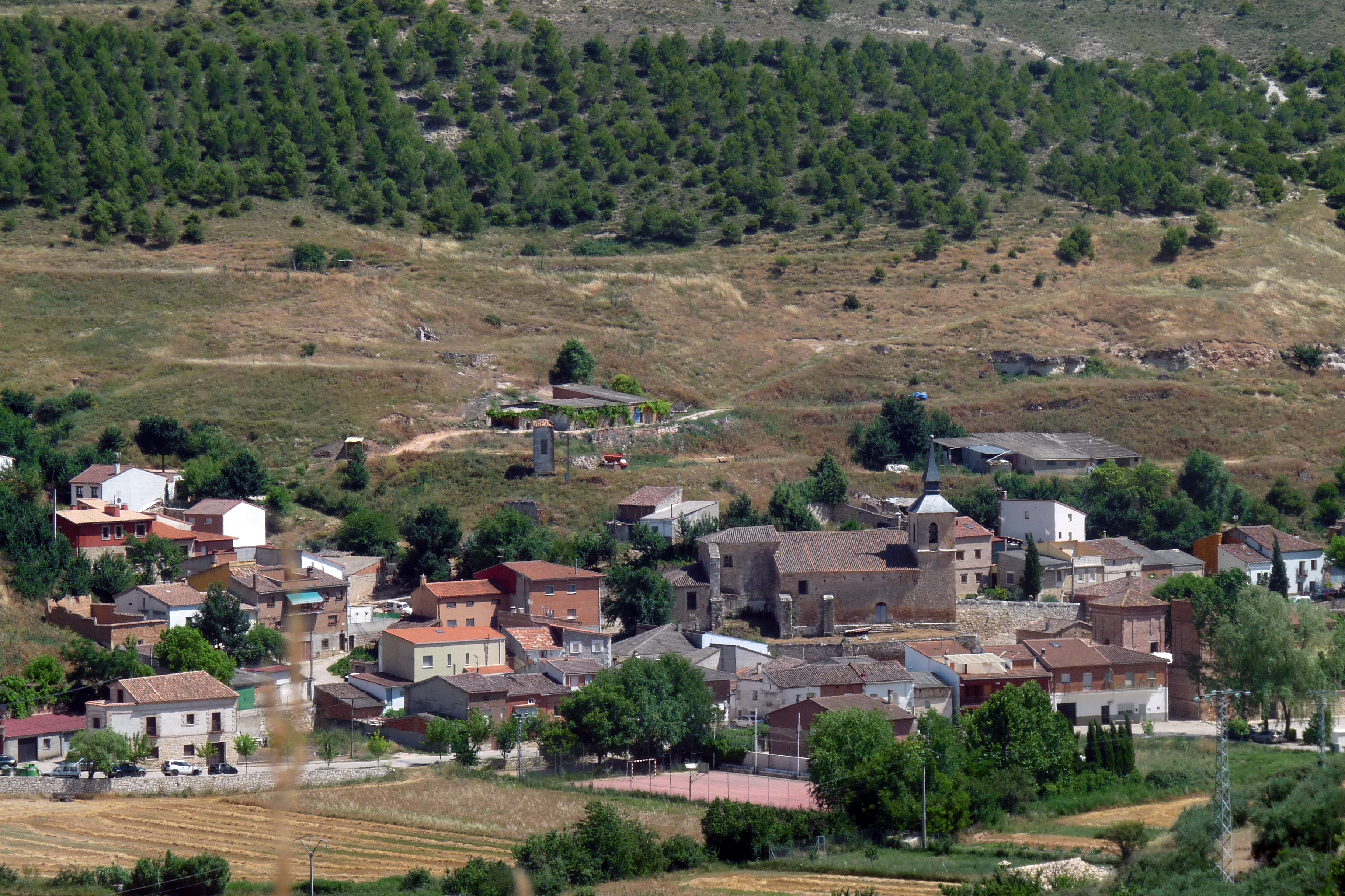 Vista de Centenera desde el noroeste.